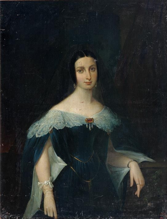 Графиня Мария Александровна Потоцкая, ур. Салтыкова (1807—1845). Исследования по атрибуции портрета провела О. Лобко.